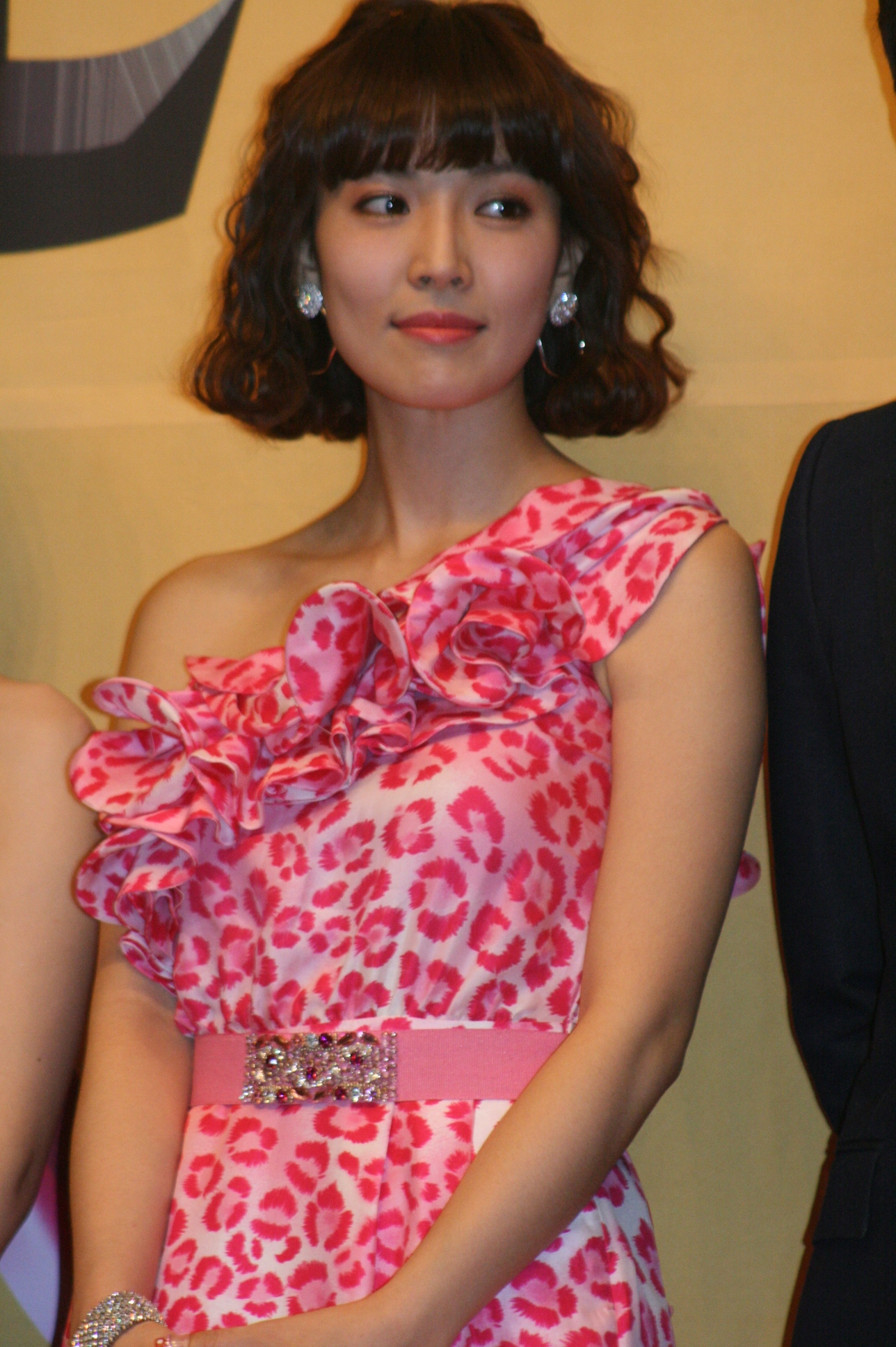 사진 121